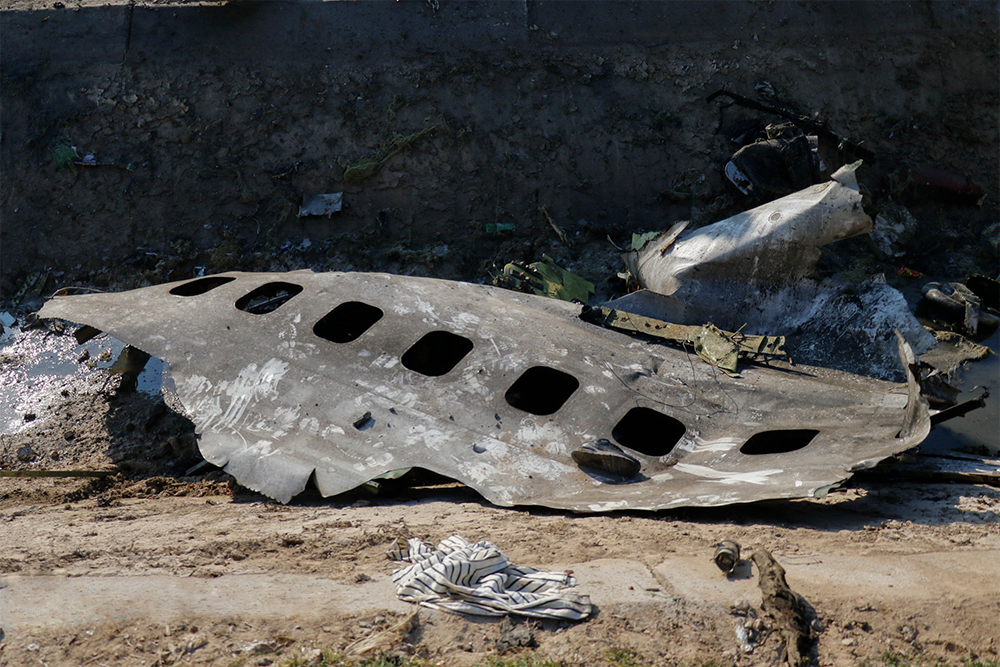 سقوط هواپیمای مسافربری بویینگ ۷۳۷ متعلق به خطوط هوایی اوکراین در نزدیکی فرودگاه امام خمینی